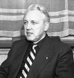 Dirigent og filolinist Øivin Fjeldstad fotografert i anledning "Verdens musikk fest", ISCM-festen hvor Fjeldstad har fått den største dirigentjobben